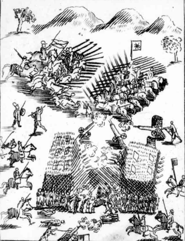 Batalla de Kilakura (Quilacura) entre fuerzas españolas y el ejército mapuche. Se puede apreciar el estandarte de combate de las huestes araucanas, la estrella de ocho puntas, Obsérvese que en la bandera que llevan los mapuche, a la derecha, aparece la flor del canelo estilizada. Esta misma estrella octogonal tiene a su vez otros significados sagrados y astronómicos que no podemos abordar, pero que distan mucho de lo algunos autores universitarios chilenos han desarrollado a partir del simbolismo presente en objetos de cerámica mapuche y su relación con el planeta Venus (W'ñelfe/Yepun).